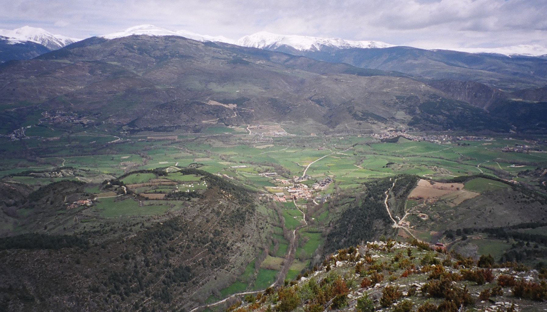 Vista aèria de Pi.